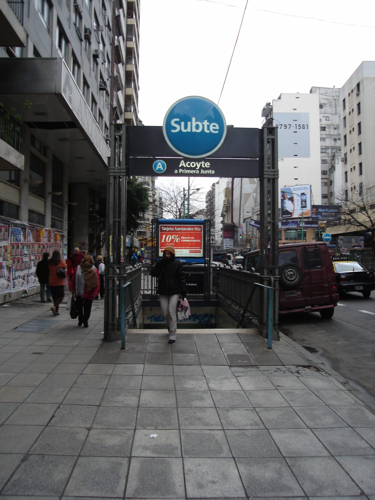 Boca de acceso a la estación Acoyte de la línea A de subterráneos porteña.